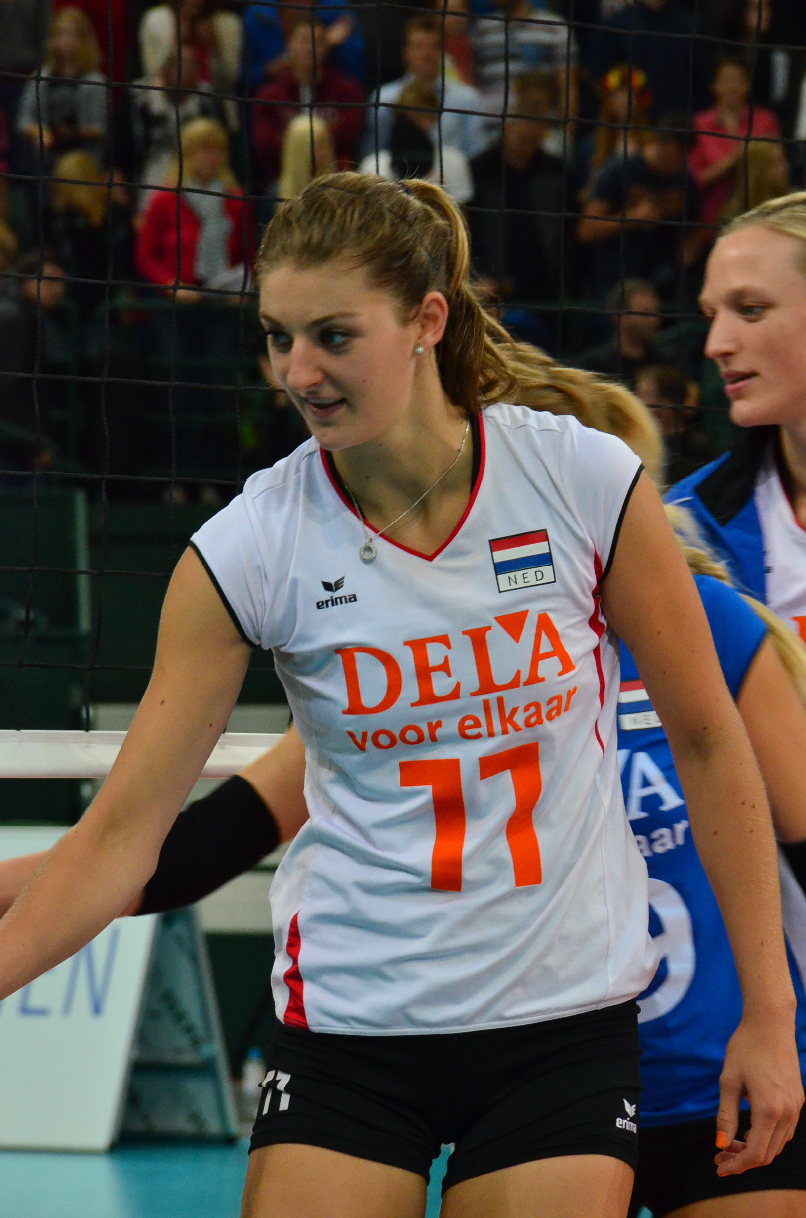 Volleyball-Europameisterschaft der Frauen 2013-Spielort Halle (Westf) Gerry-Weber-Stadion - Spiel 8. September 2013 (Spanien-Niederlande)